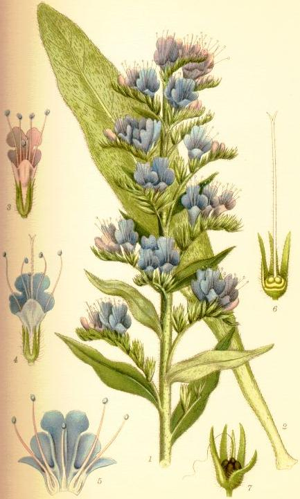 Blåeld (Echium vulgare) stjälktopp med blomställningar, blad från stjälkens bas yngre blomma, sedd framifrån eller underifrån, i ståndarstadiet (2/1), densamma som äldre, i pistillstadiet (2/1), blomkronan uppfläckt med de oliklånga, på kronrörets insida fästade ståndarna (2/1), blomfoder i längdsnitt med pistillen och den blekgula, ringformiga honungskörteln (3/1), blomfodret med mogen, fyrdelad klyvfrukt (2/1)